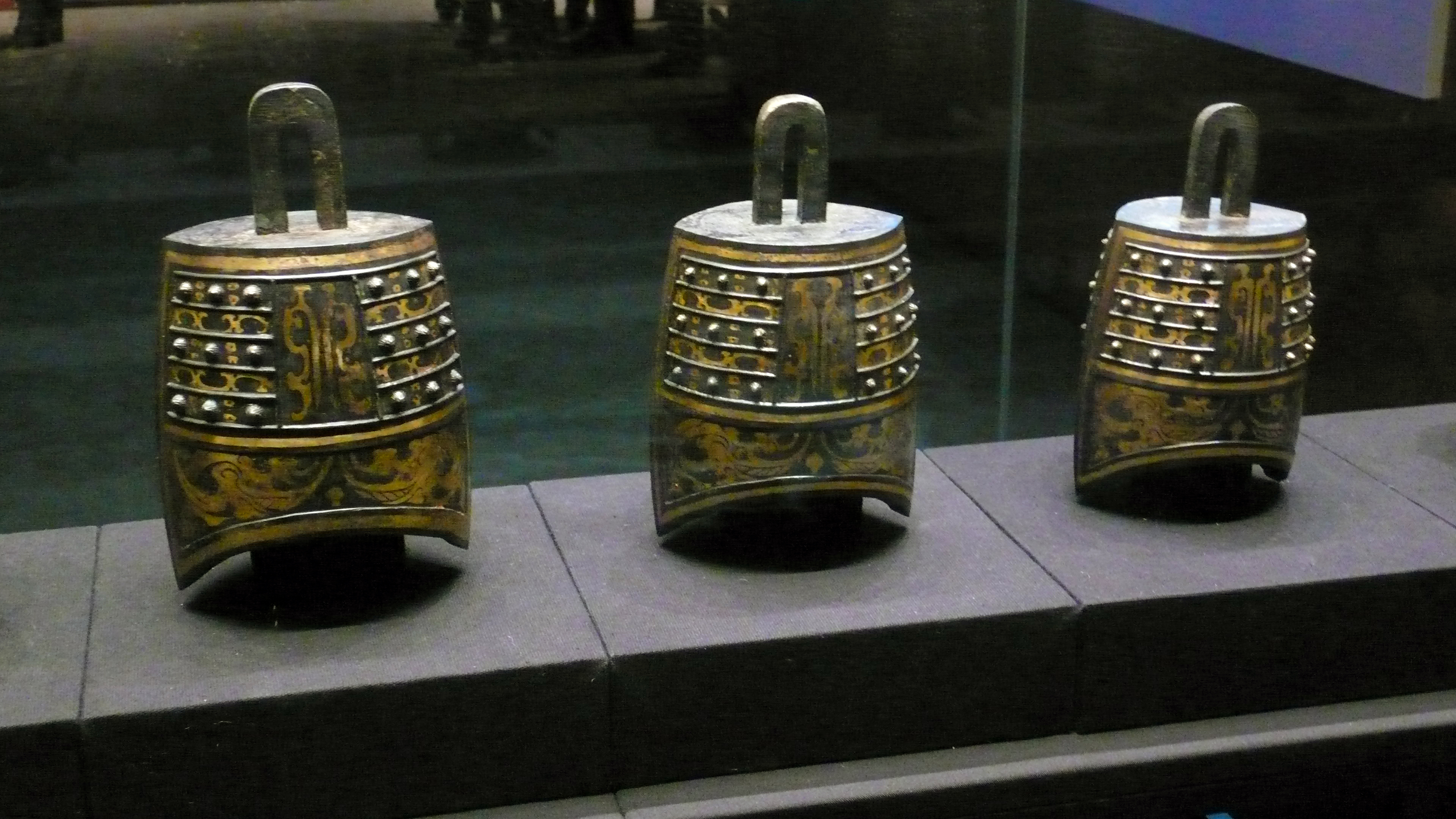 青铜纽钟。海昏侯国遗址出土。首都博物馆临展。